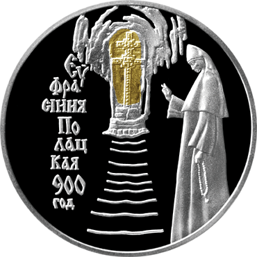 Білоруська монета номіналом 20 рублів до 900 річчя з дня народження Єфросинії Полоцької